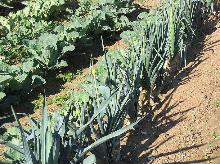 Rang de poireaux Photo prise à deltebre (Espagne) en avril 2004 Jean Tosti 10/2004